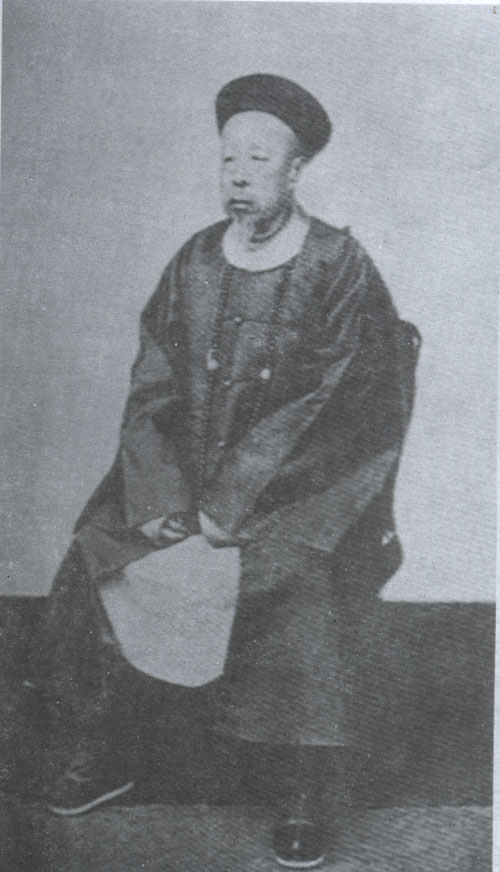 张曾扬（1852年－1920年），字小帆，又字润生、抑仲，号静渊。直隶南皮（今属河北）人。清末政治人物。